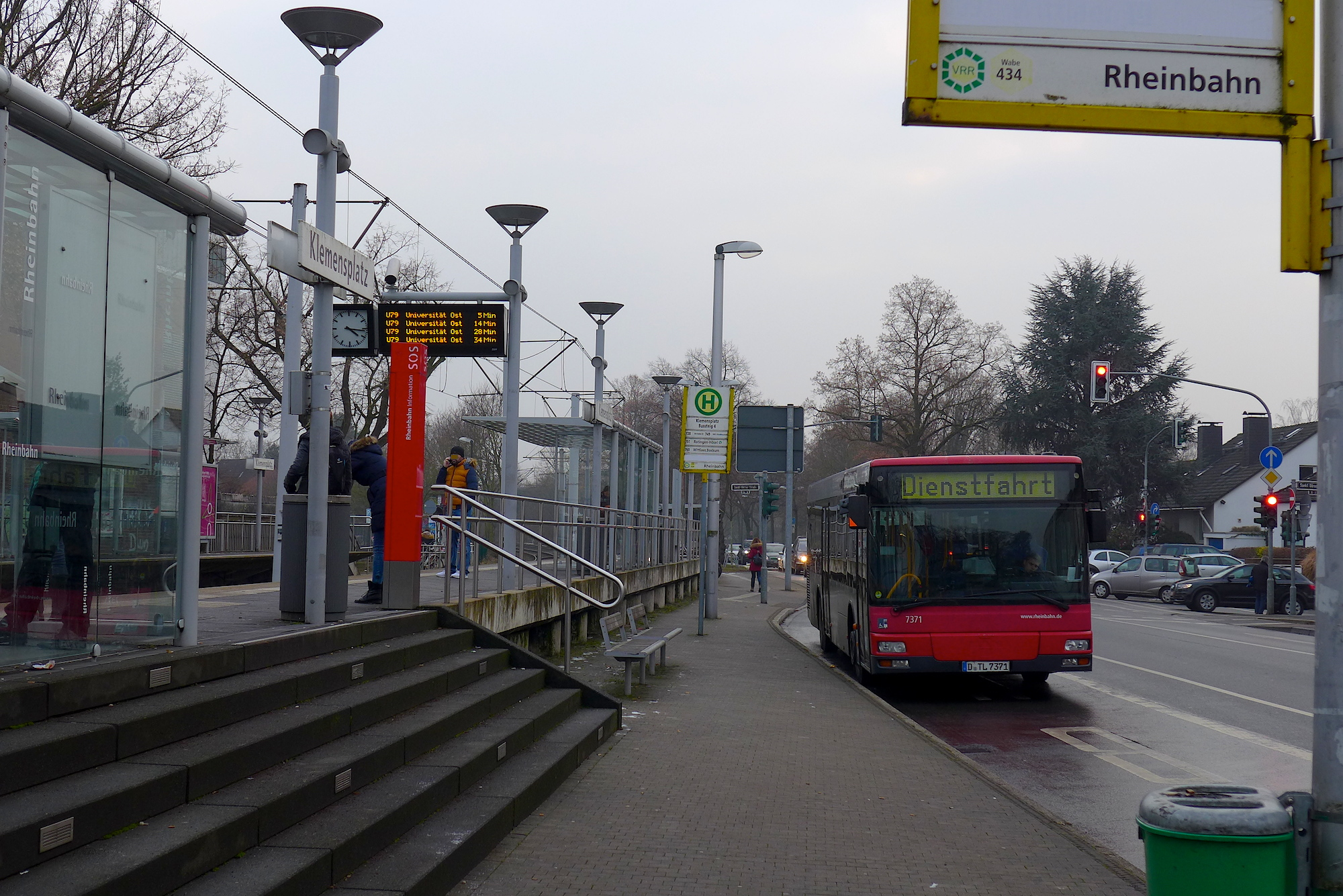 Площадь Клеменса - главный транспортный узел Кайзерсверта.